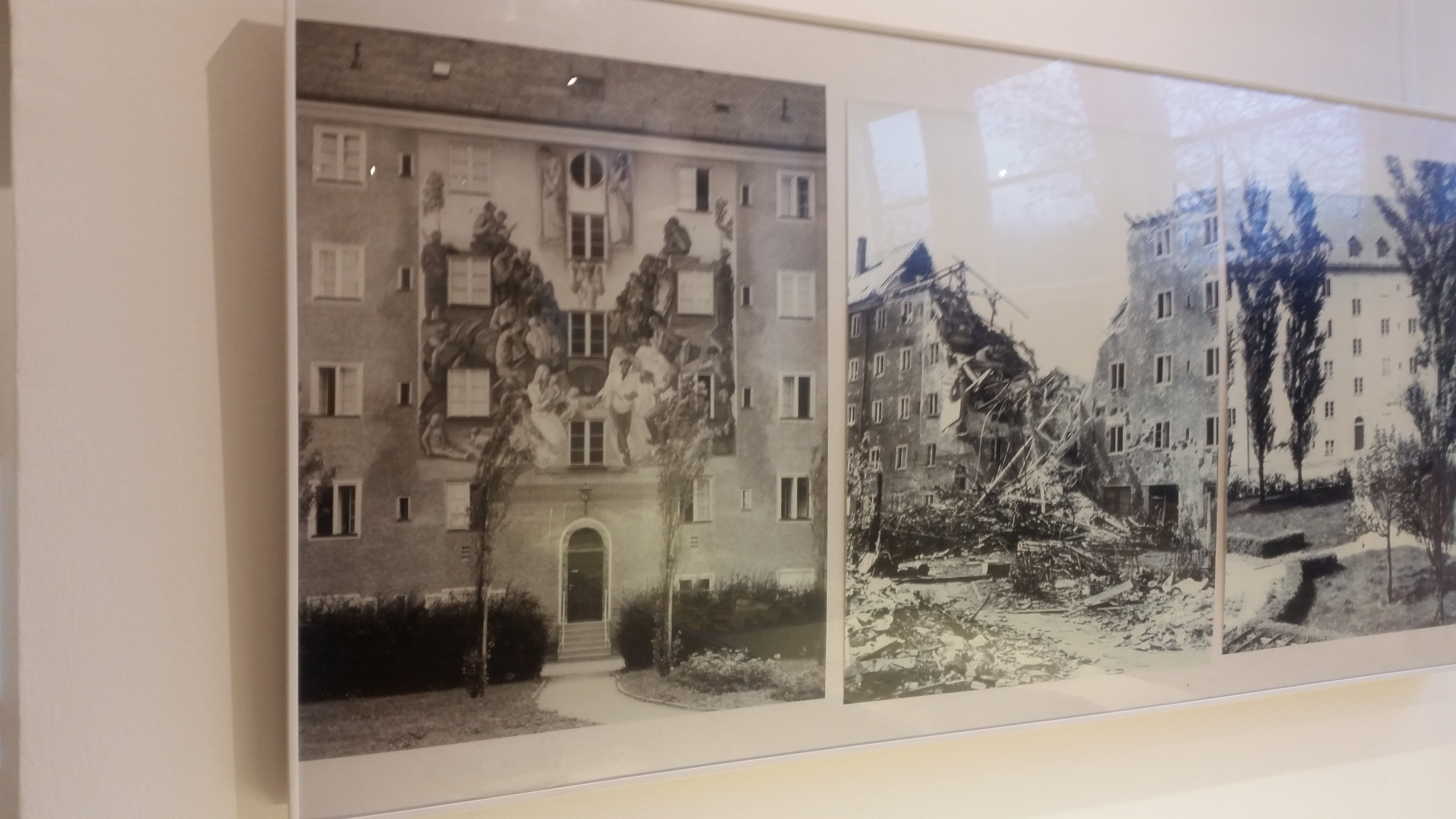 Borstei-Museum, Darstellung der Situation vor und nach dem Bombentreffer.